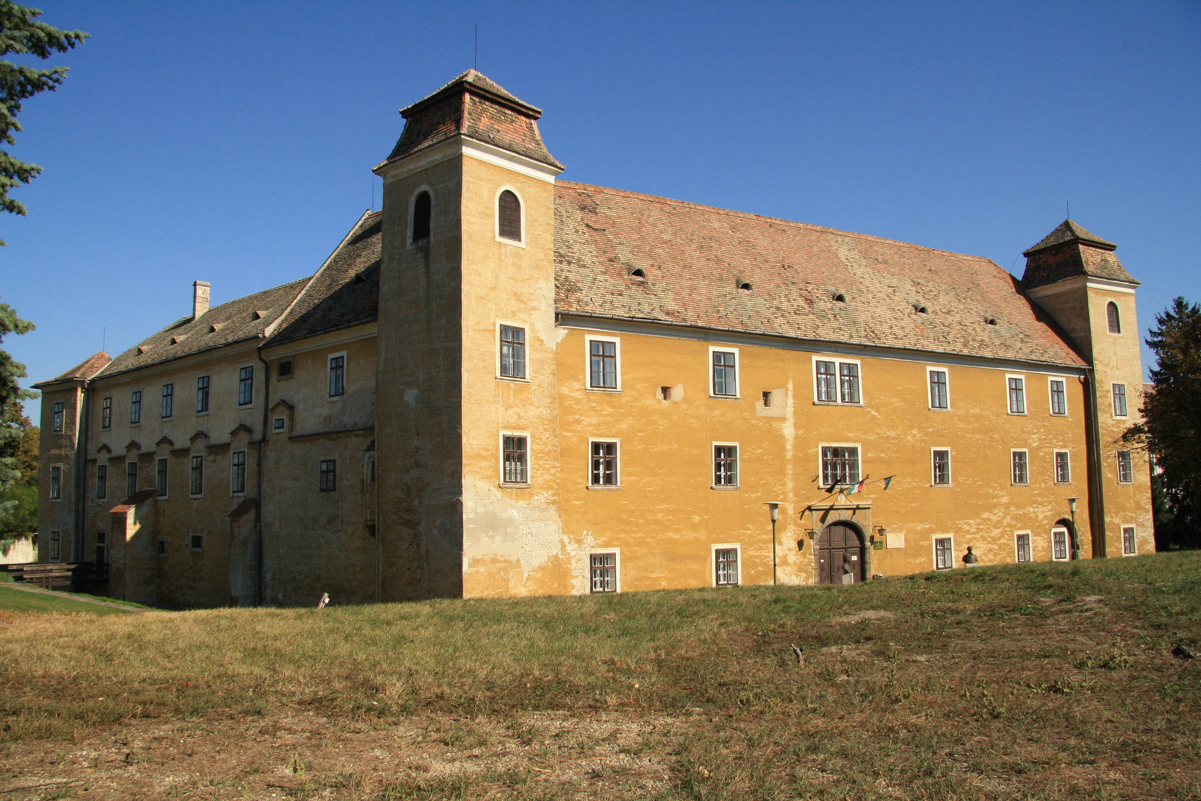 Mosonmagyaróvári vár épülete (Agrártudományi egyetem főépülete)